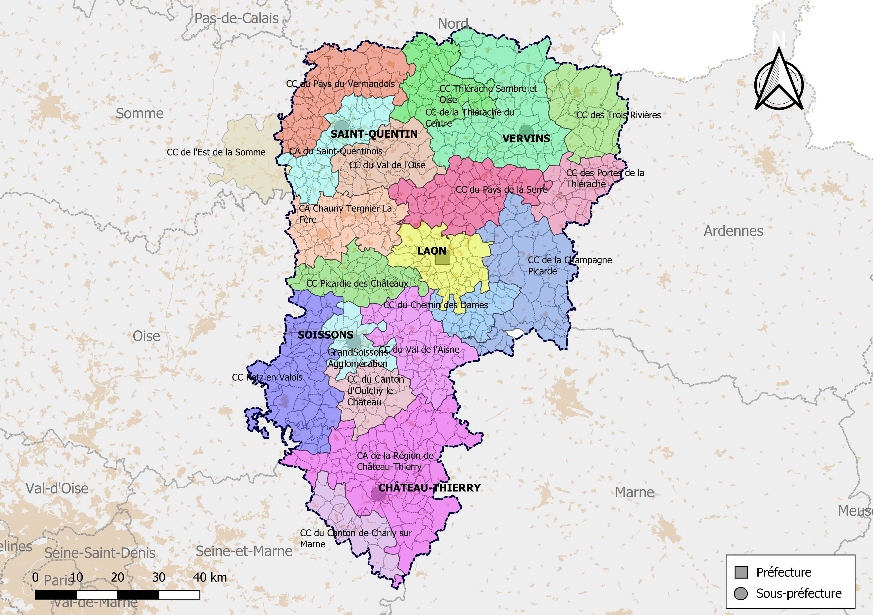 Carte des intercommunalités du département de l'Aisne, France. Composition au 1er janvier 2019.